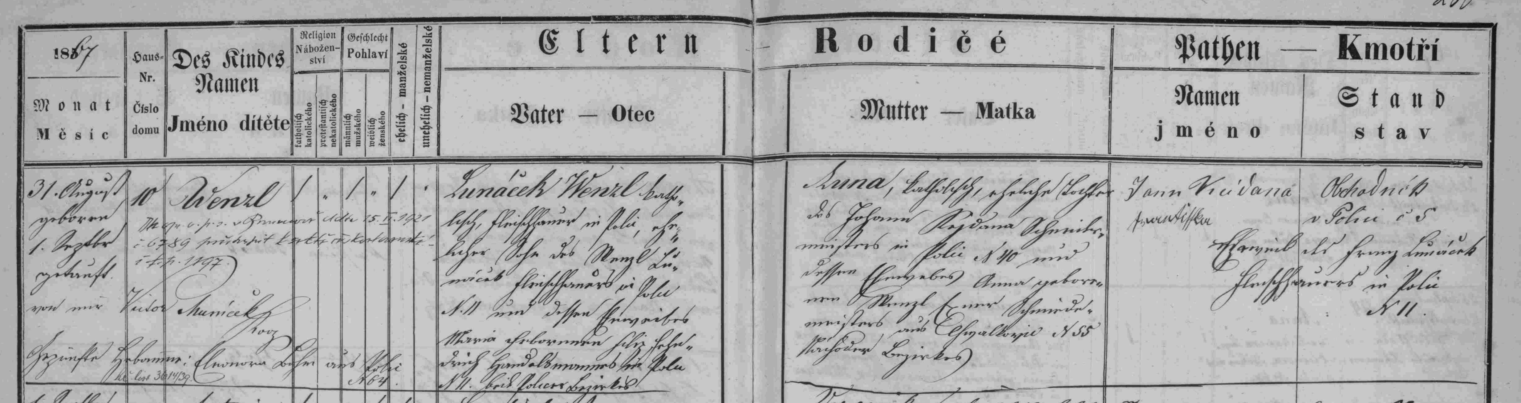 matriční zápis o narození a křtu Václava Luňáčka (matrika N index N 1859-1870 Police nad Metují (SOA Zámrsk)